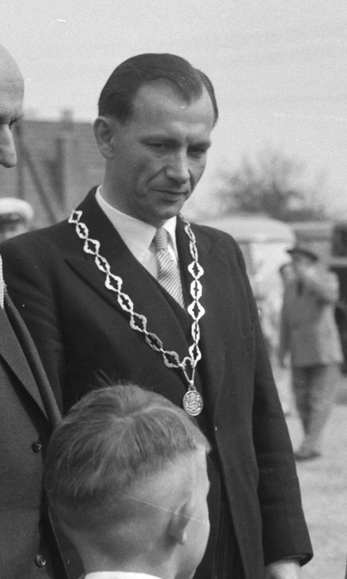 Collectie / Archief : Fotocollectie Anefo Reportage / Serie : Bezoek koningin Juliana aan Noord- en Midden Limburg Beschrijving : Koningin bezoekt Limburg ( Mook Moddelaar ) Datum : 14 mei 1956 Locatie : Limburg Trefwoorden : KONINGIN Fotograaf : Bilsen, Joop van / Anefo Auteursrechthebbende : Nationaal Archief Materiaalsoort : Negatief (zwart/wit) Nummer archiefinventaris : bekijk toegang 2.24.01.04 Bestanddeelnummer : 907-7592